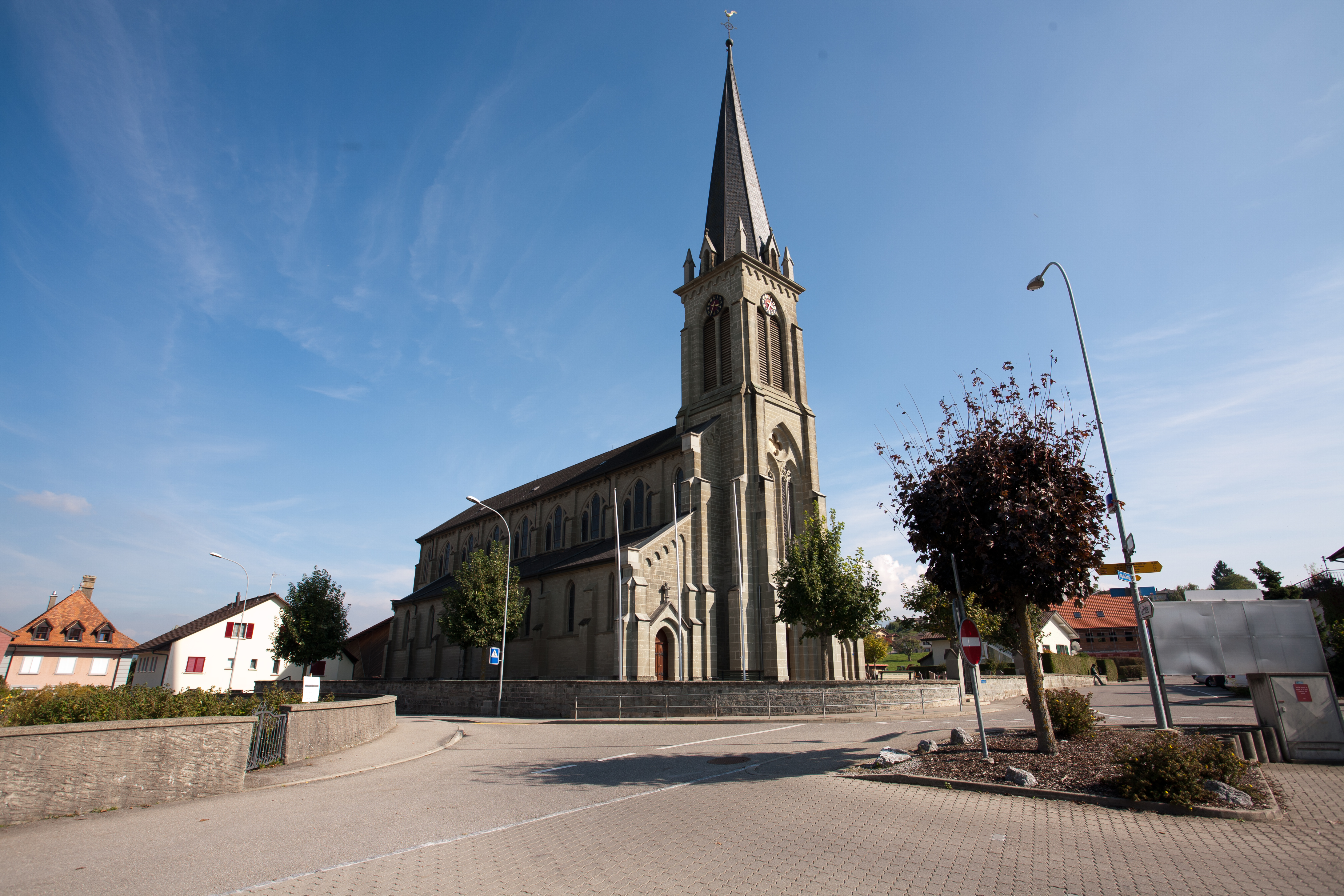 Farvagny Eglise Saint Vincnet